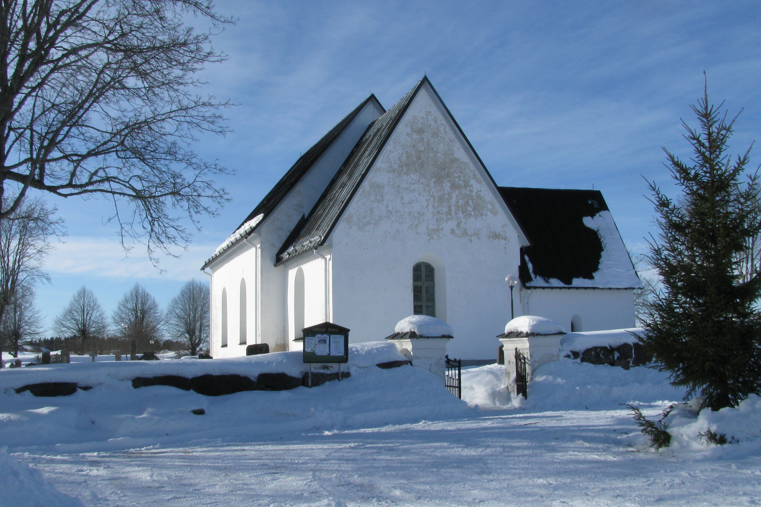 Lohärads kyrka i Norrtälje kommun.